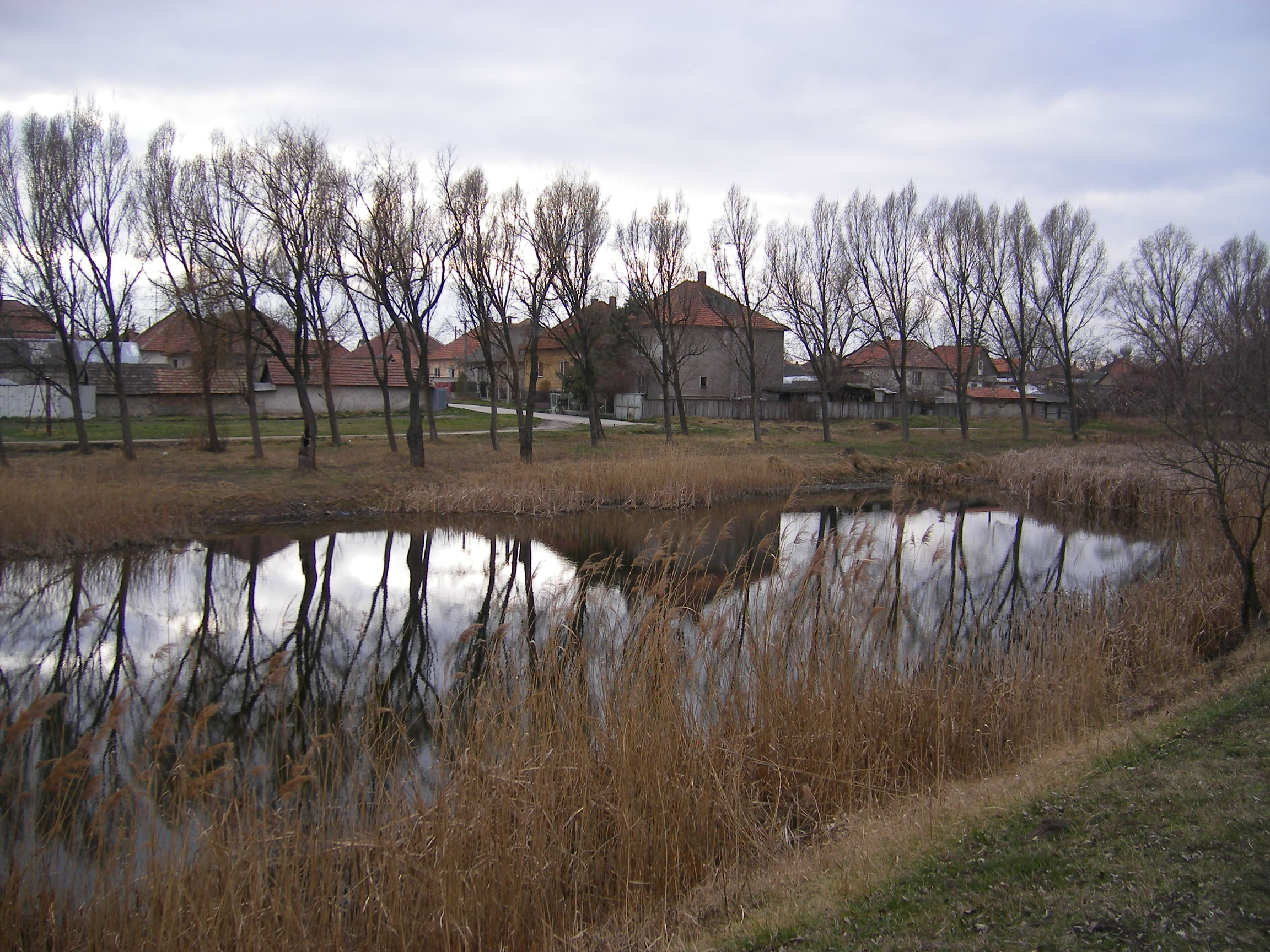 Zlatná na Ostrove - Csallóközaranyos